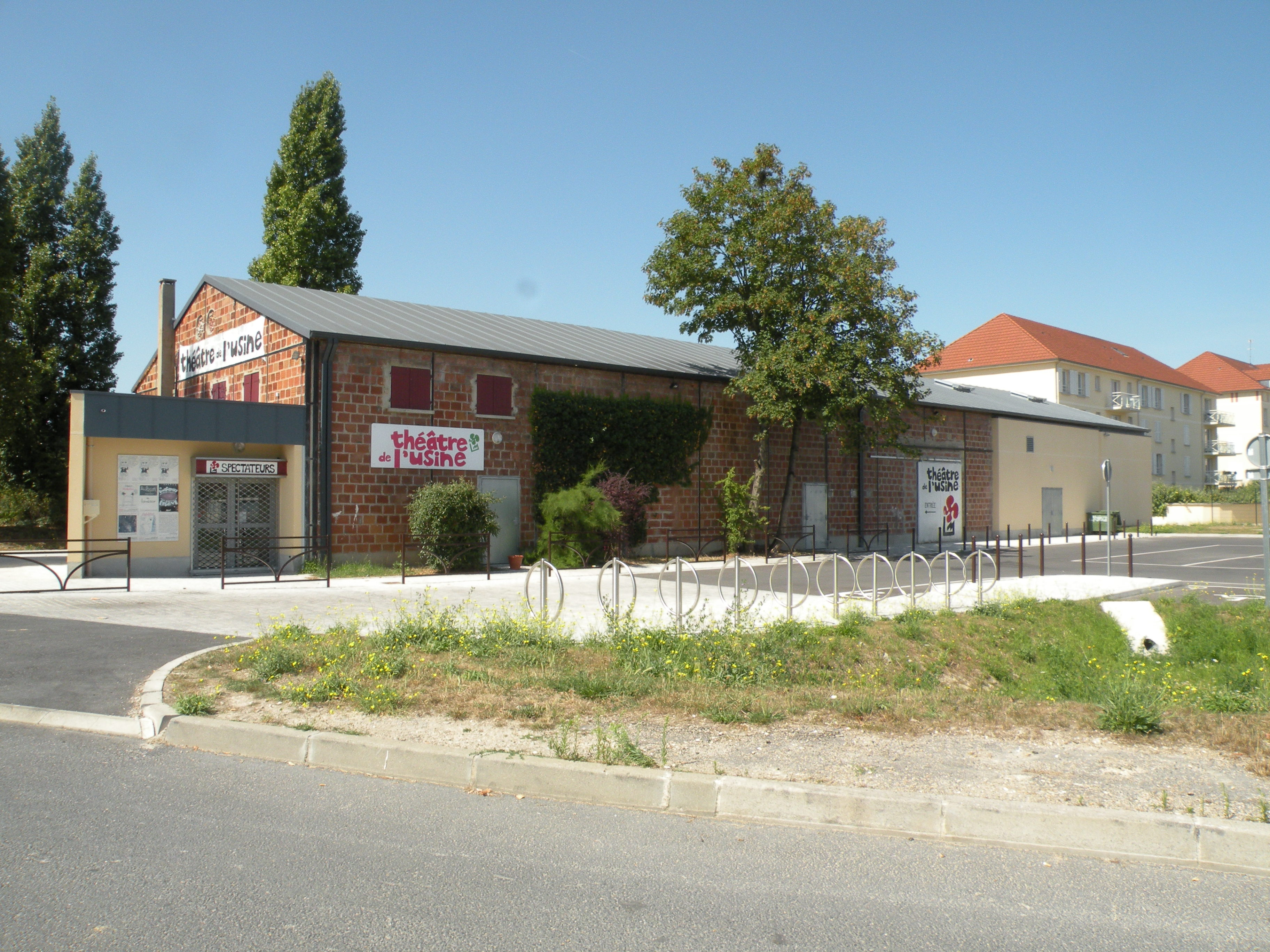 théâtre de l'usine à Éragny-sur-Oise